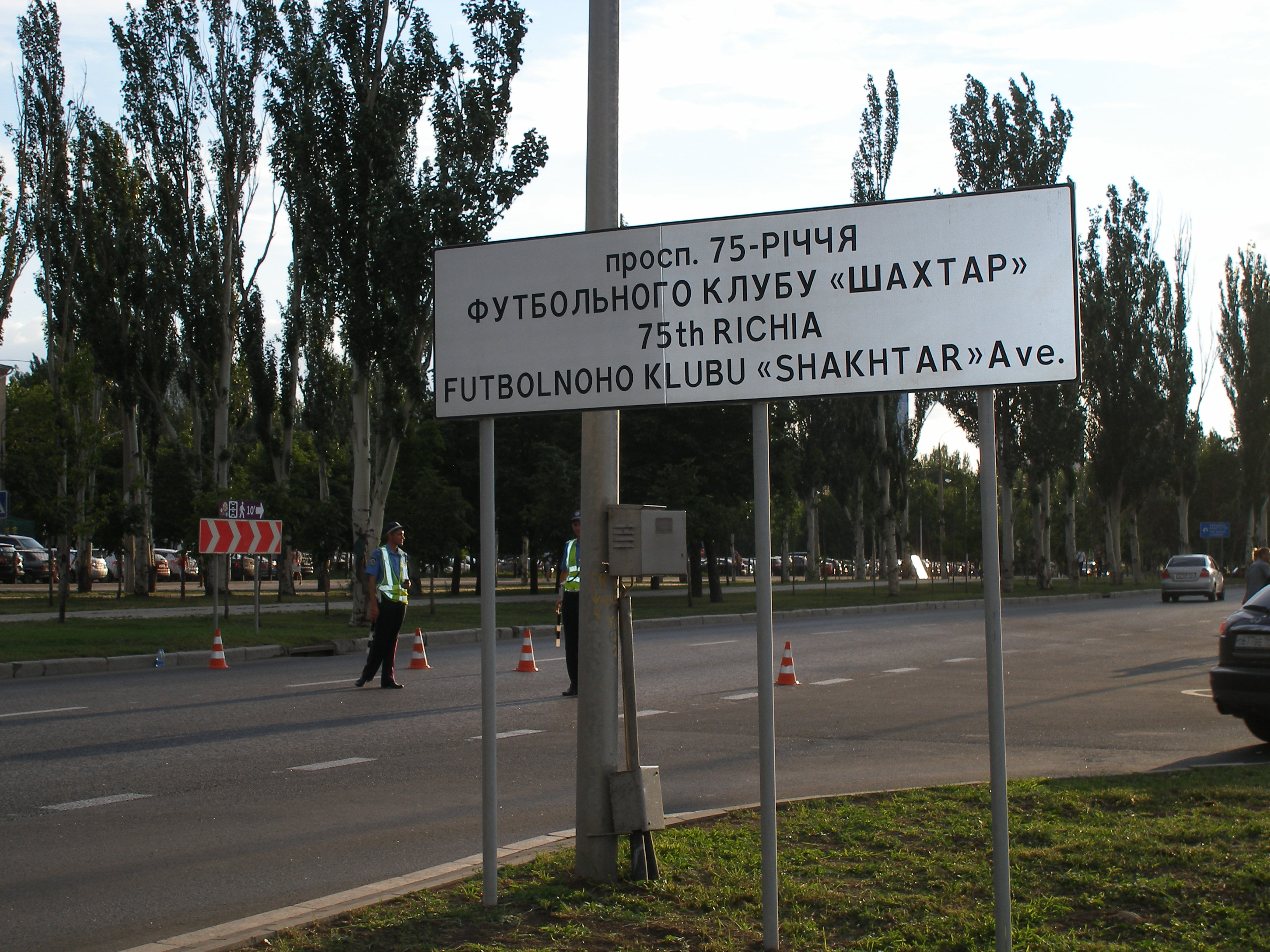 Евро-2012. Донецк. Парк около стадиона «Донбасс-Арена». 27 июня 2012 года.